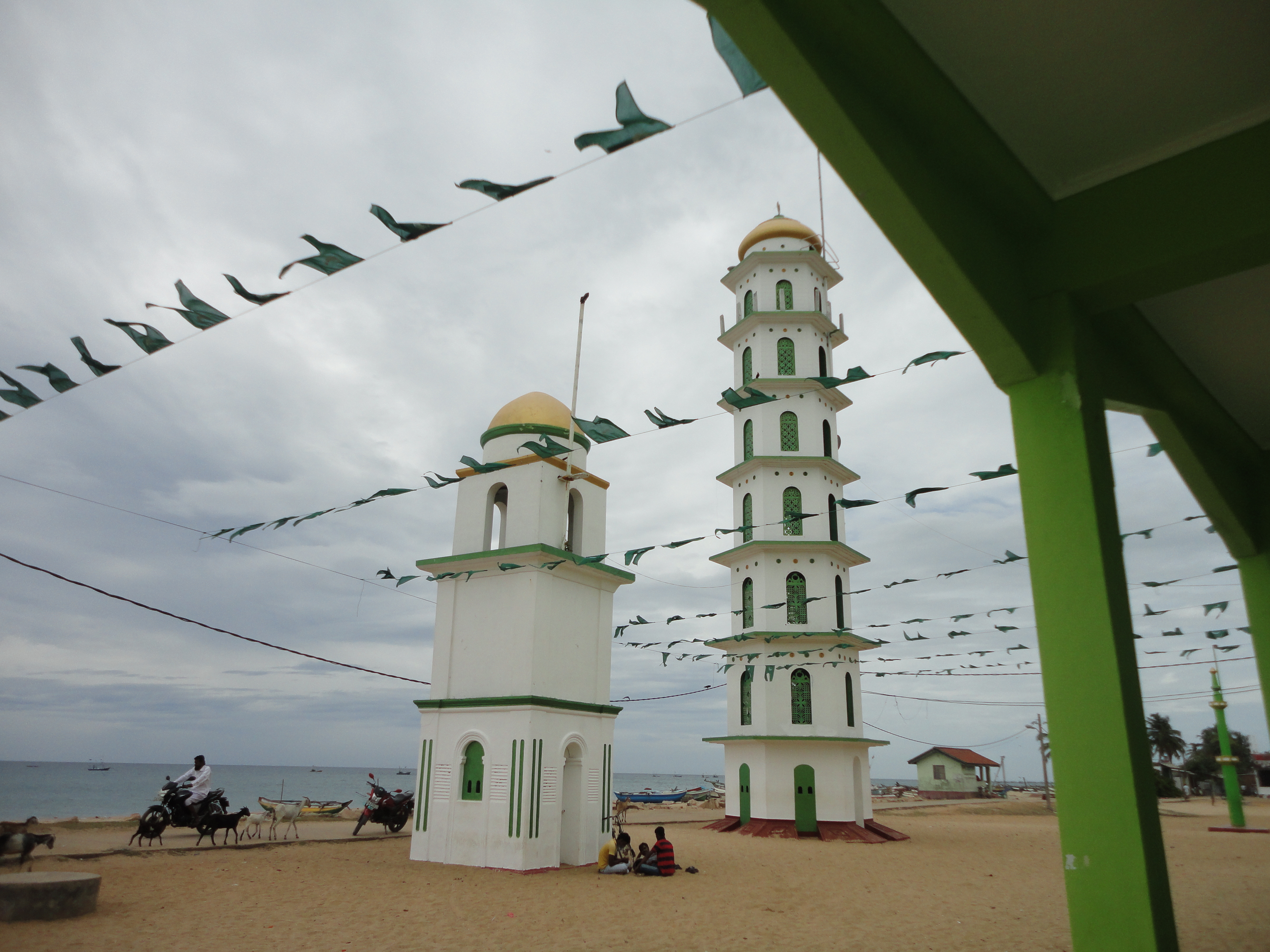 கல்முனைக்குடி நாகூர் ஆண்டகை தர்ஹாவின் வங்கக் கடலோரத் தோற்றம்